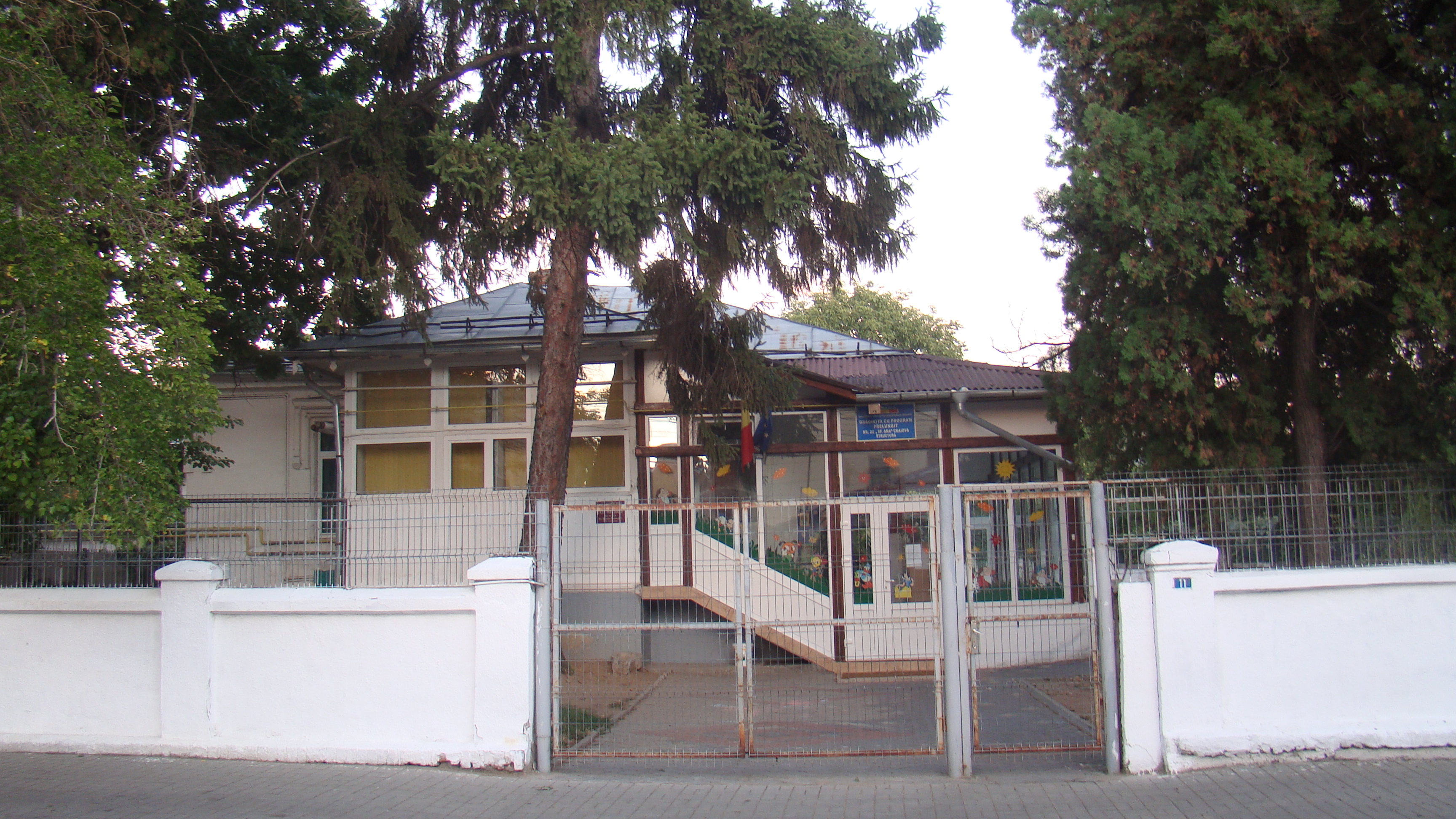 Casa Papazoglu